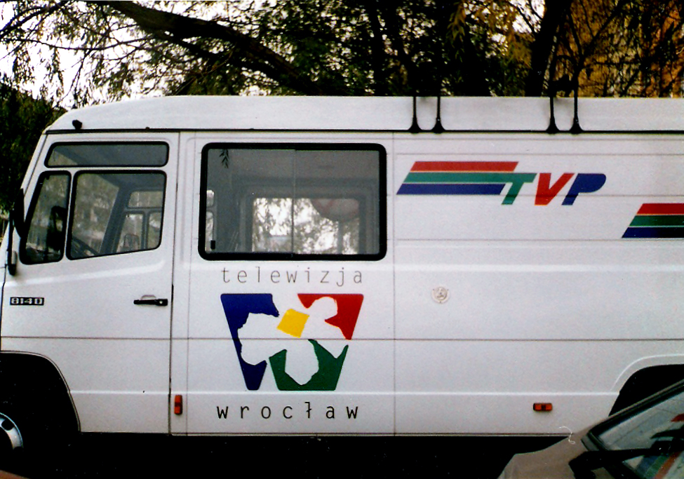 Fotografia wozu transmisyjnego Telewizji Wrocław